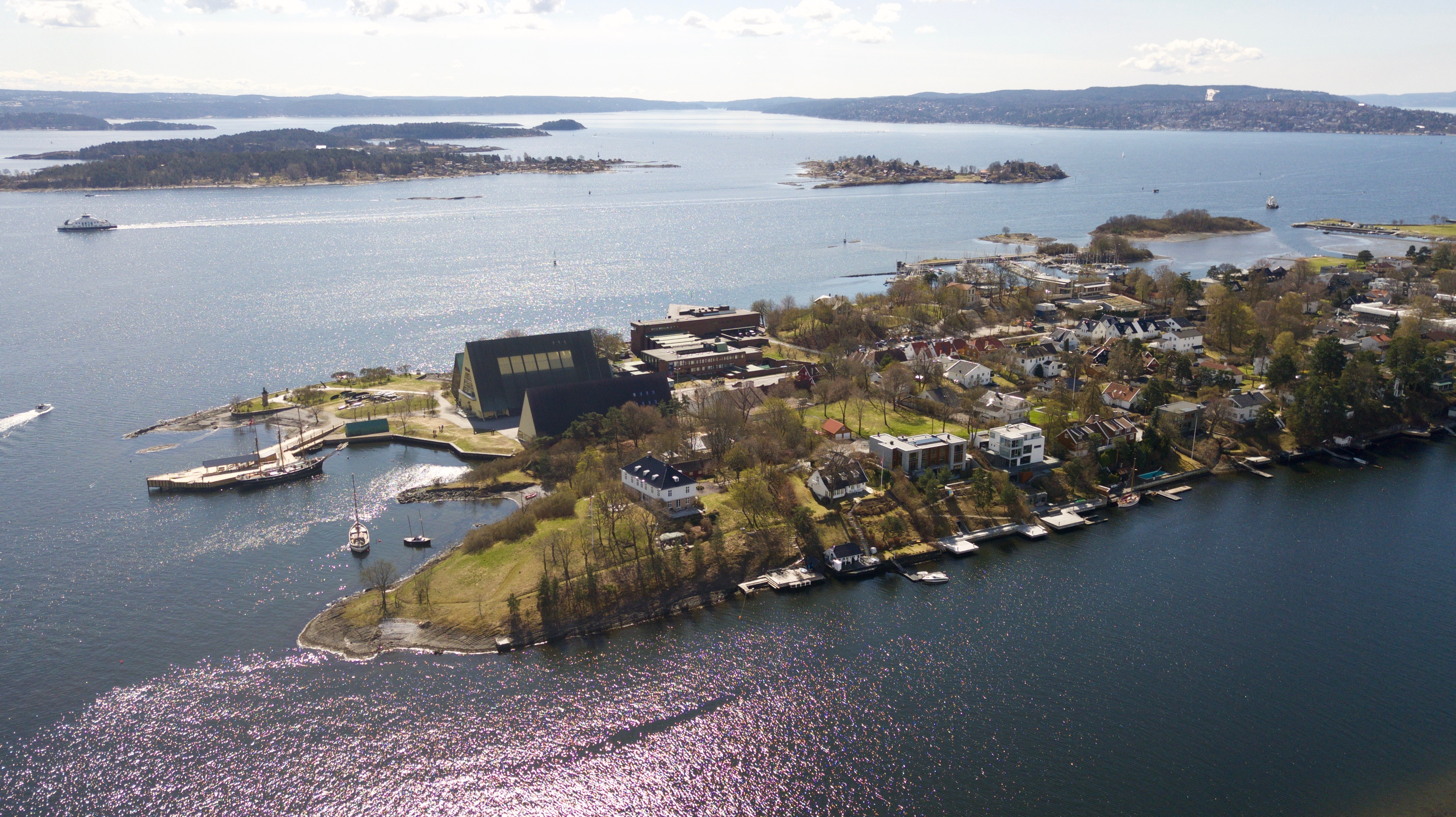 Bygdøynes i Oslo.